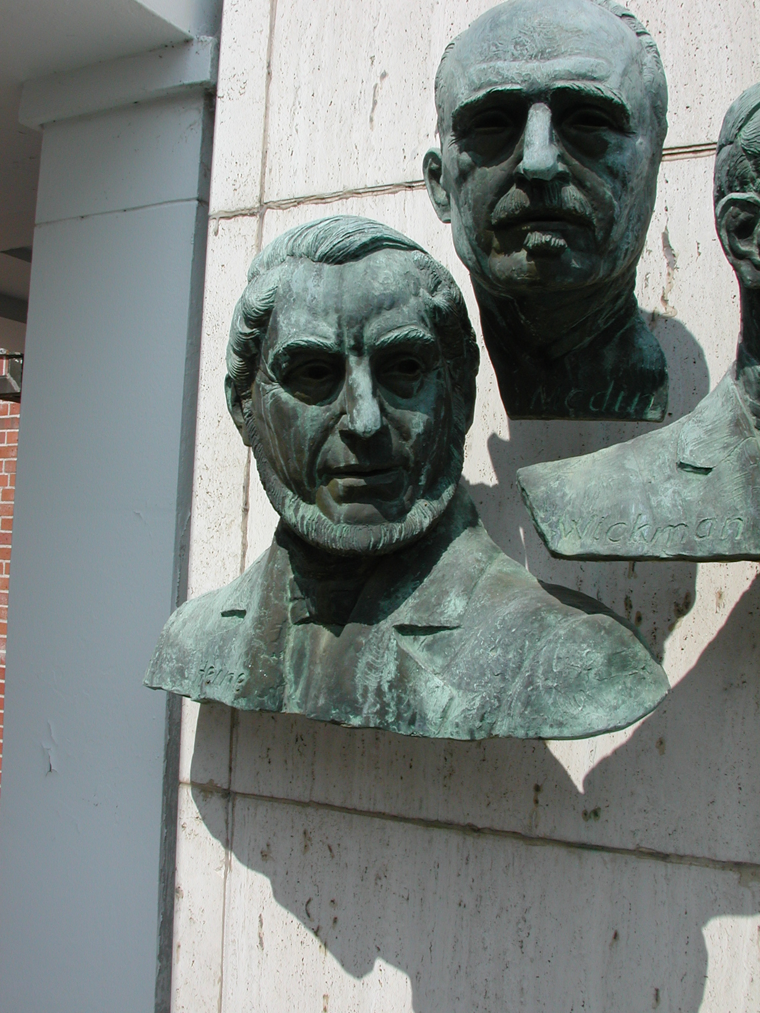 Bronze Bust of Jakob Heine and Karl Oskar Medin at Warm Springs